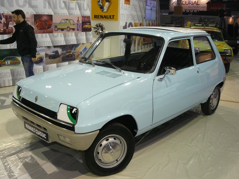 Retromobile 2012